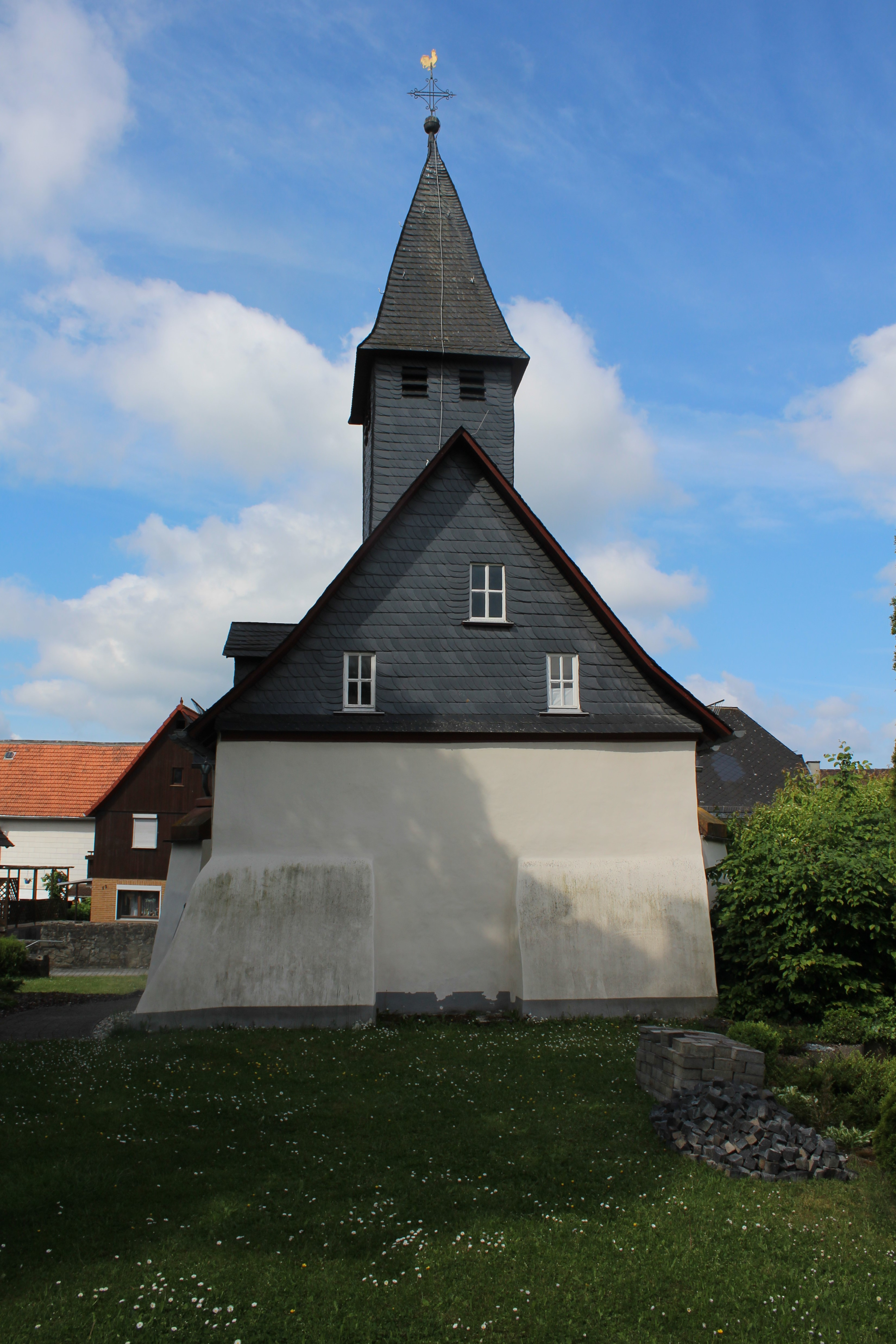 Ev. Kirche Laufdorf, Wetzlar, Lahn-Dill-Kreis, Hessen, Deutschland